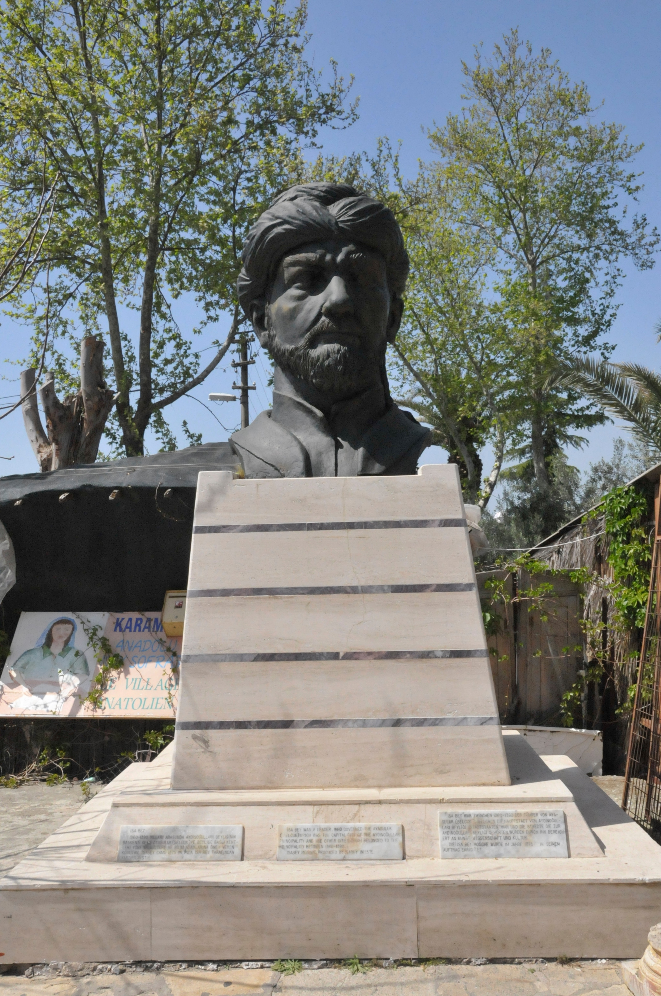 Isa-Bey-Büste vor der Isa-Bey-Moschee in Selcuk